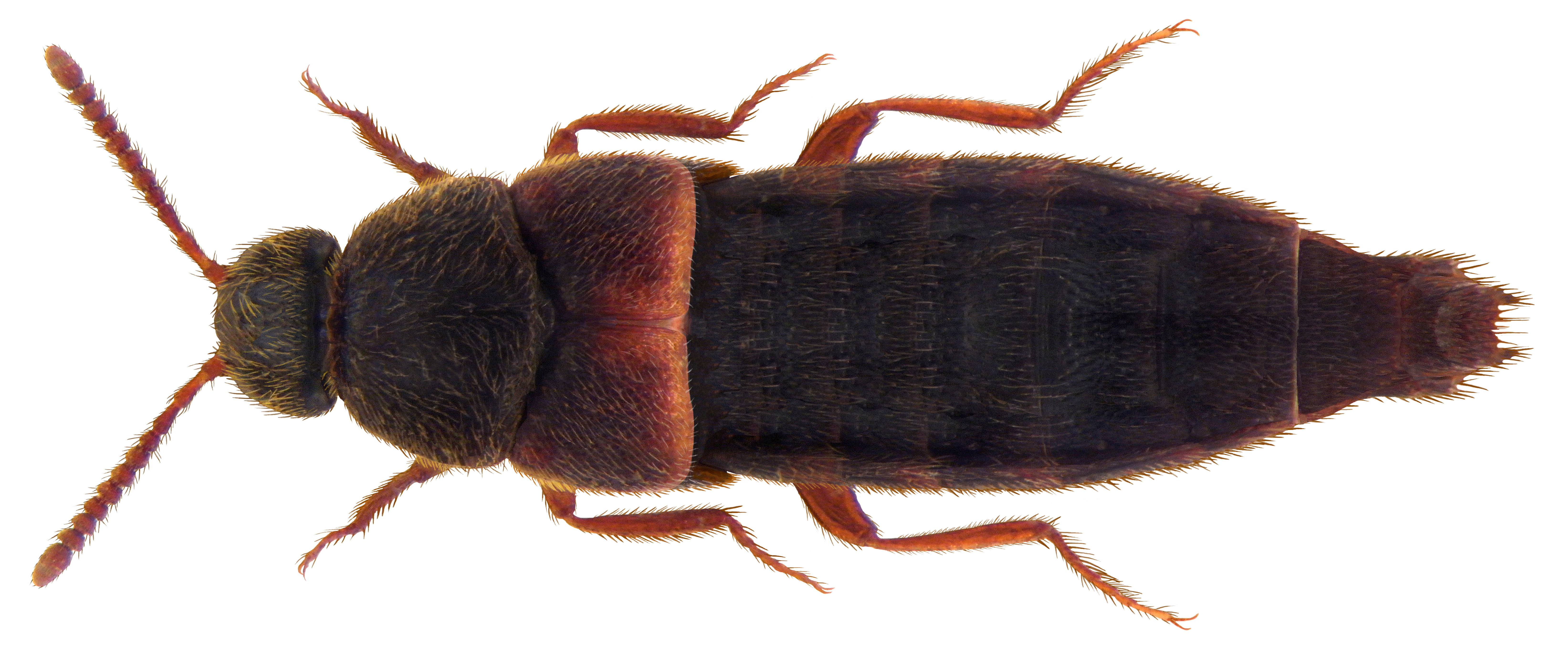 Familie: Staphylinidae Groesse: 1,5-1,9 mm Fundort: Kenia, Tsavo National Park leg. U.Schmidt, 1991; det. R.Pace, 2007 Paratypus Photo: U.Schmidt, 2010